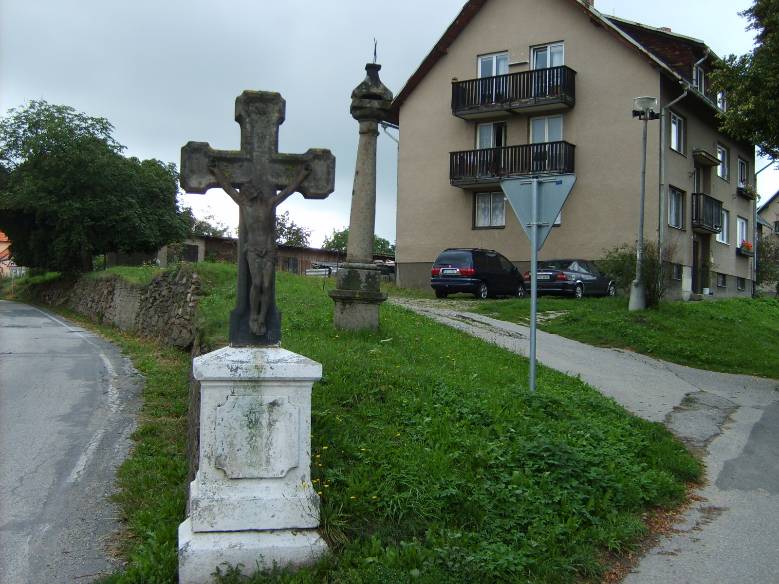 Boží muka v horní části Benešova nad Černou